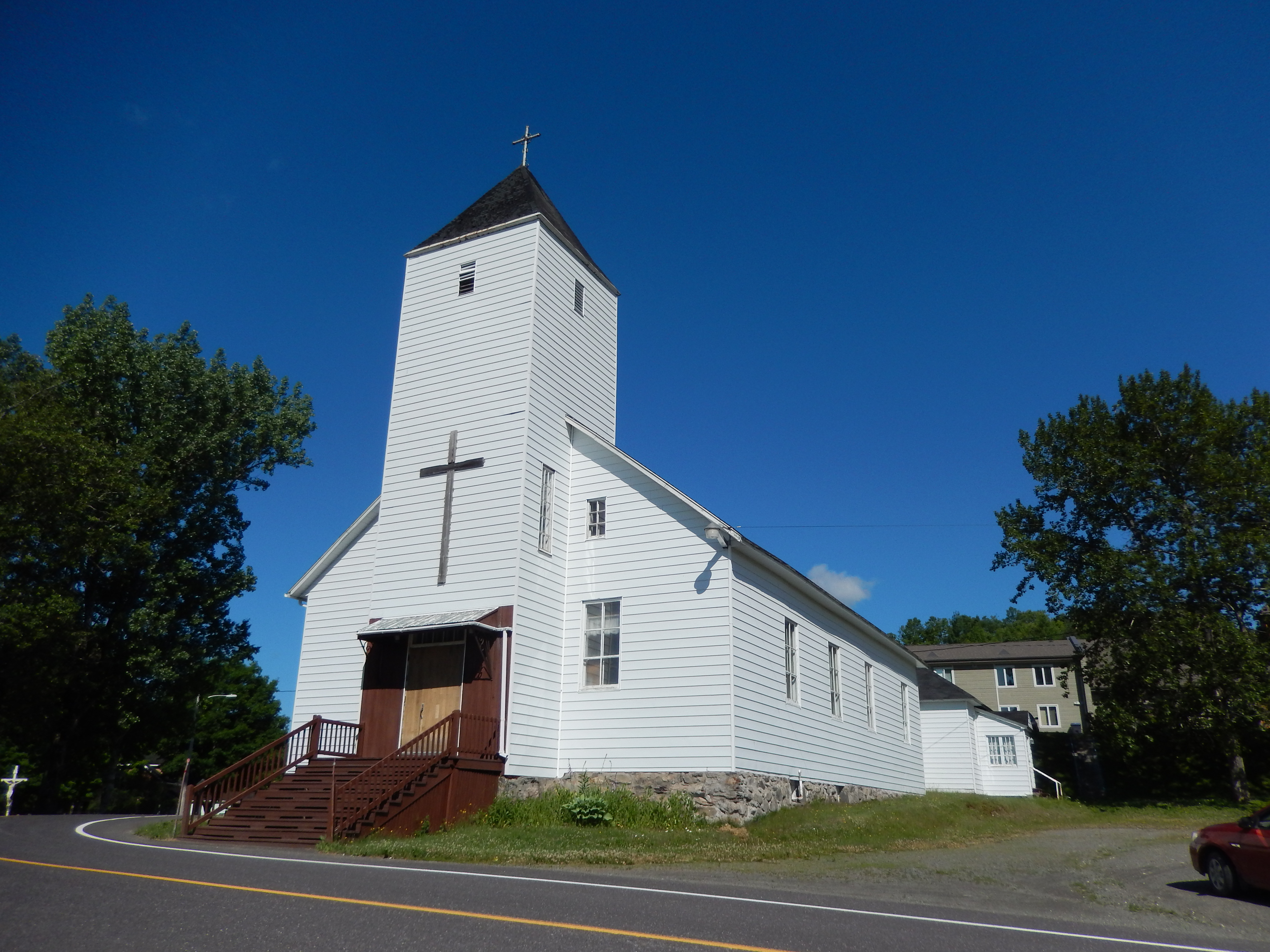 Église Saint-Jean-de-la-Lande à Saint-Jean-de-la-Lande, construite en 1932